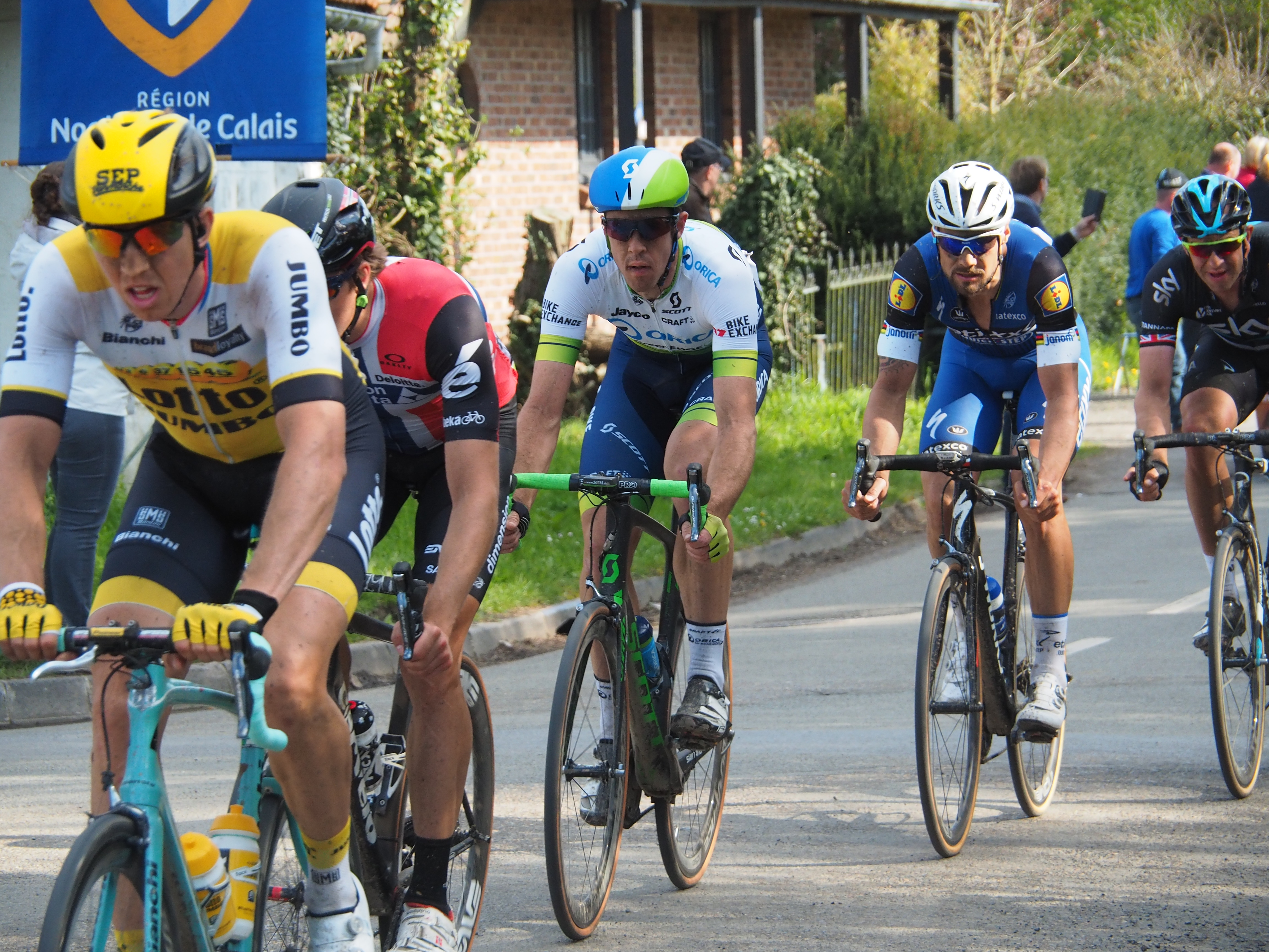 Paris-Roubaix 2016 : la tête de la course à 8 kilomètres de l'arrivée. De gauche à droite : Sep Vanmarcke, Edvald Boasson Hagen, Mathew Hayman, Tom Boonen et Ian Stannard